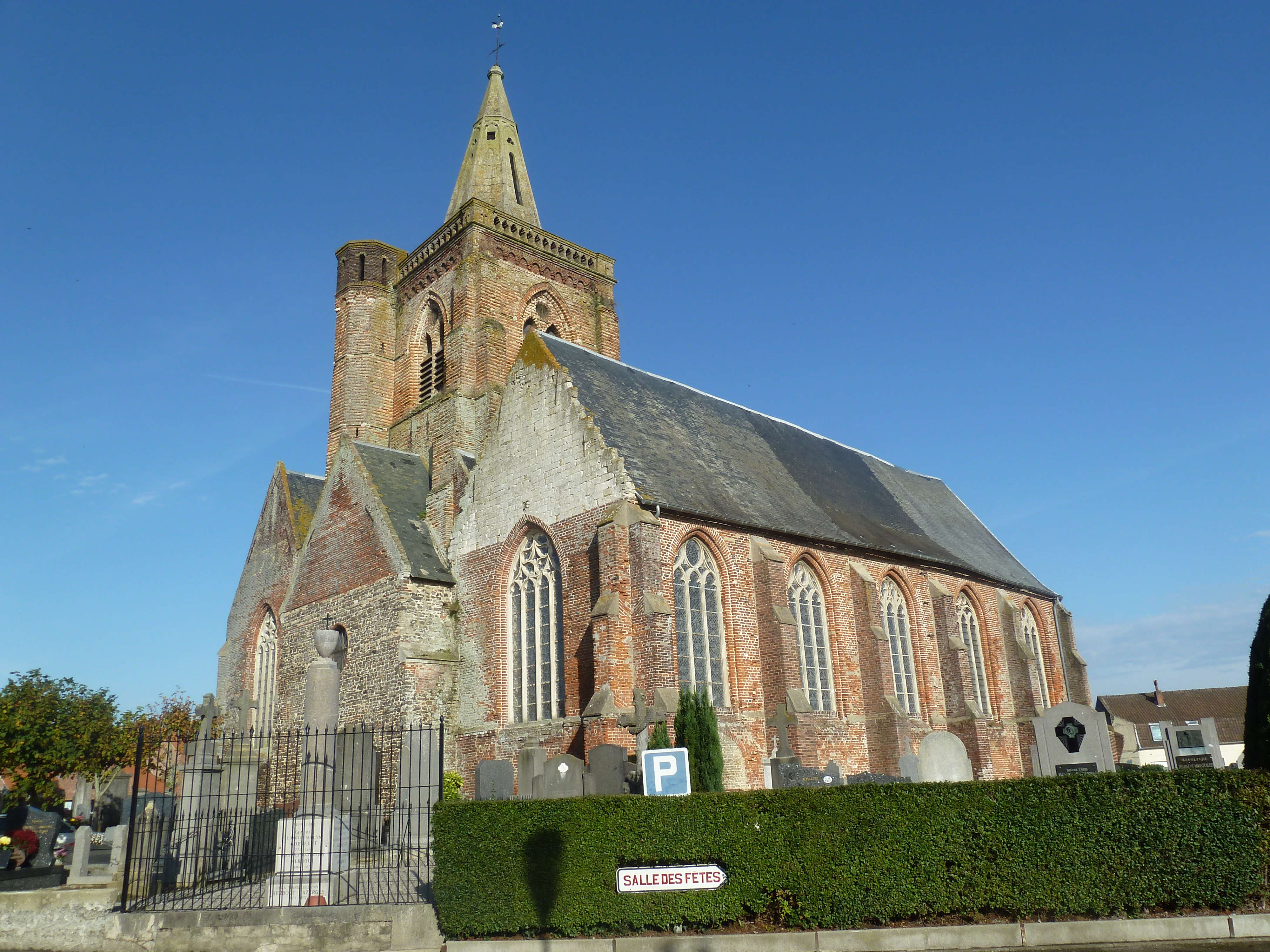 Eglise Saint Omer.- Staple (59577) Staple